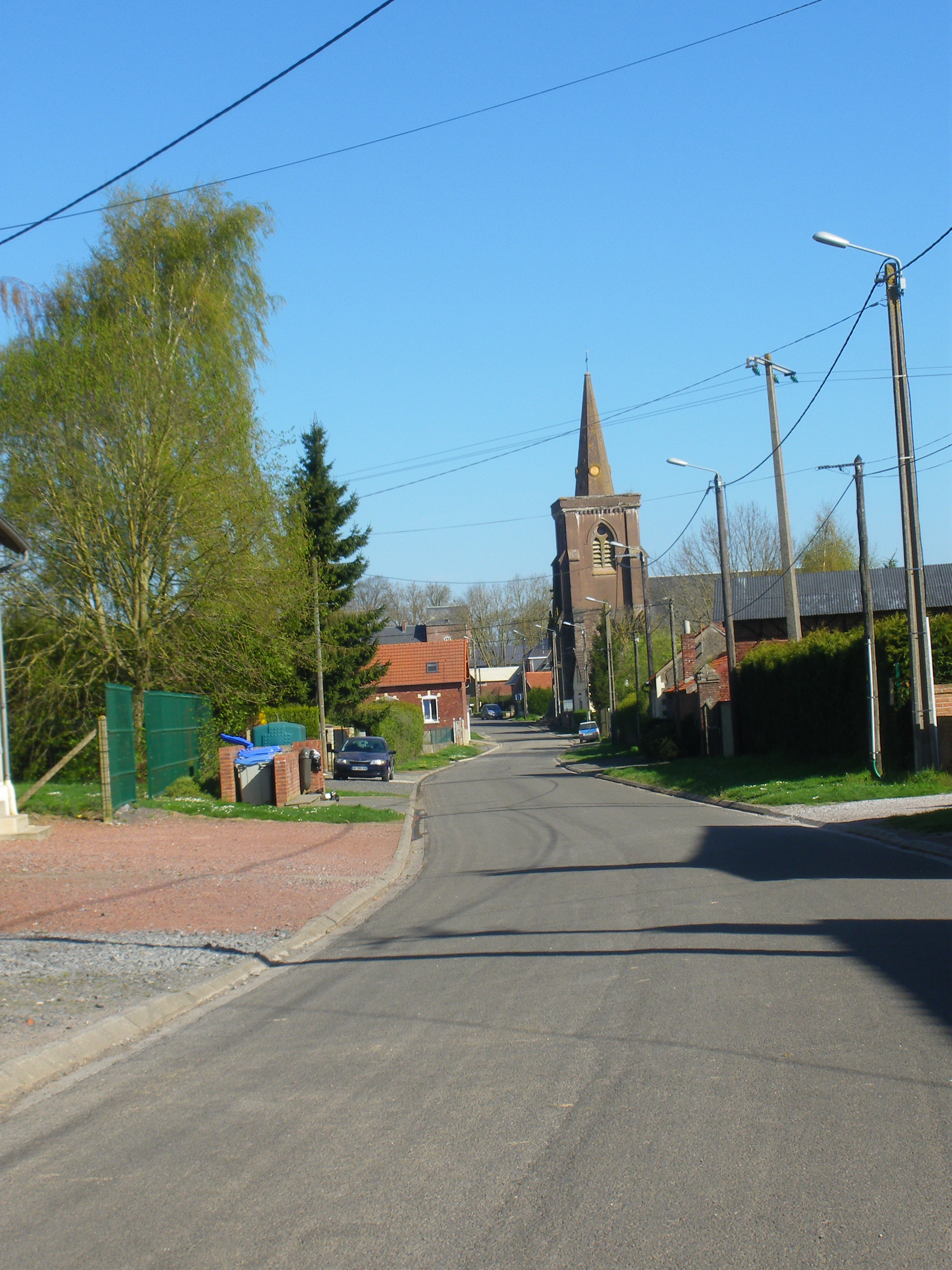 Vue d'une rue de la commune de Favreuil. Au fond, l'église.